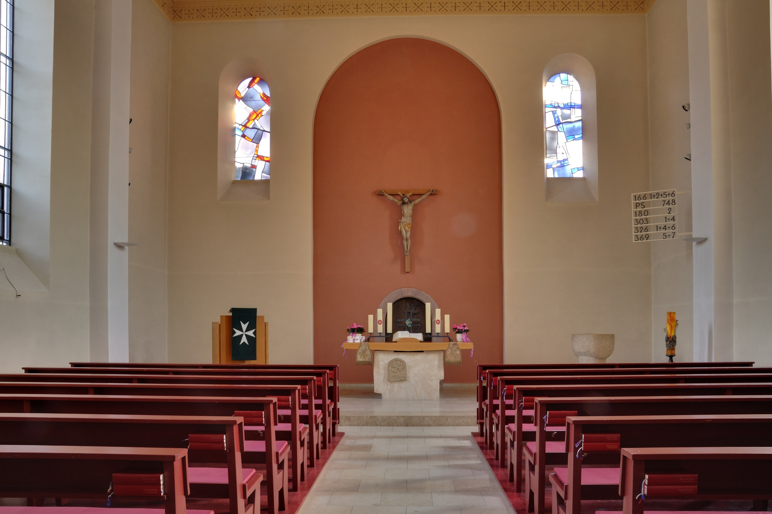 Kandern-Feuerbach: Kirche, Langhaus mit Blick zum Chor